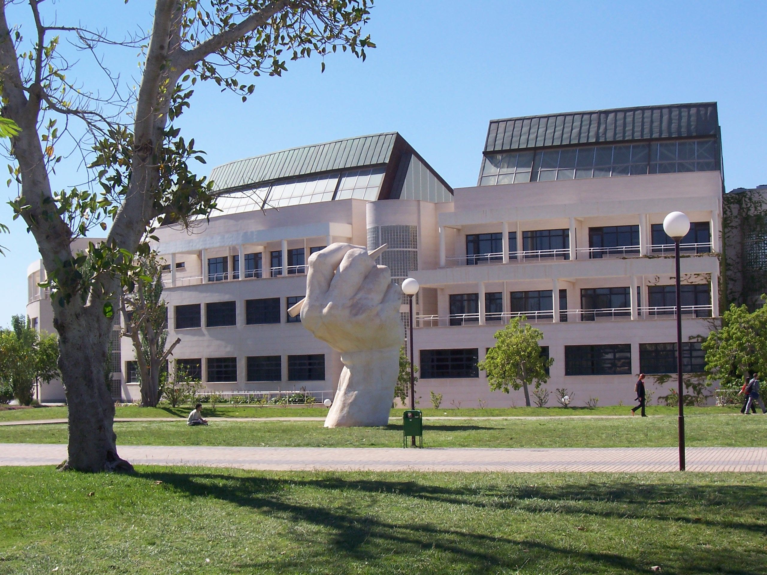 Dibuixar l'espai. Campus Universitat d'Alacant - Universitätscampus Universität Alicante - Campus University of Alicante - Campus Universidad de Alicante - Campus Université d'Alicante - Campus Università di Alicante